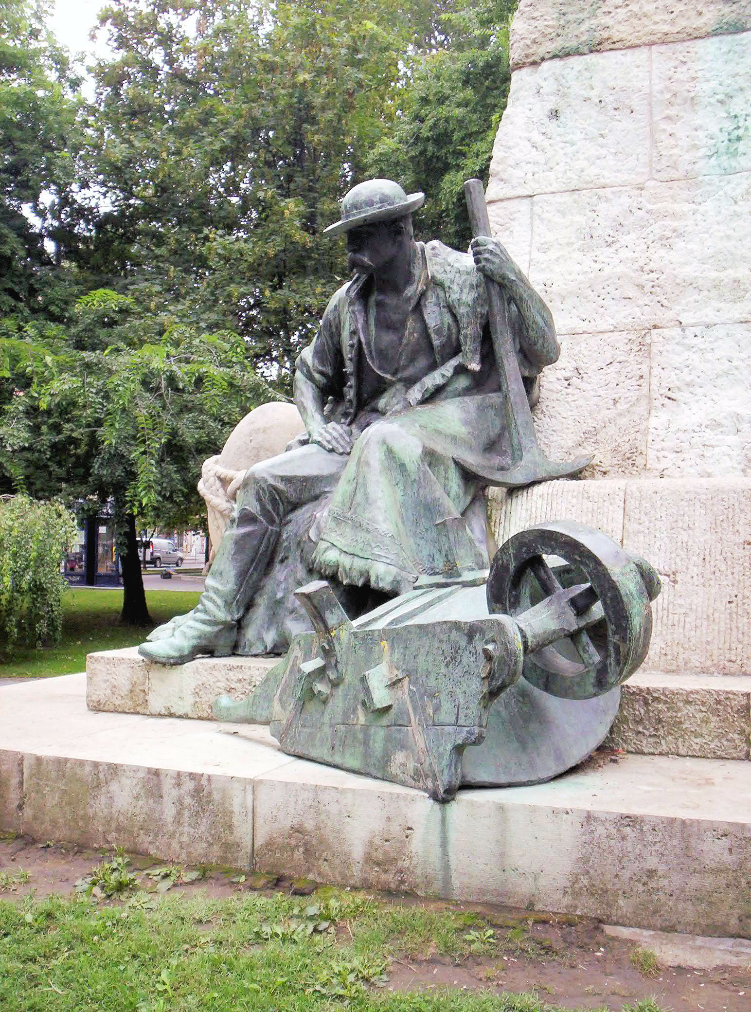 A szegedi Vásárhelyi-szobor egyik mellékalakja. Pásztor János (1881–1945) alkotása (1905)